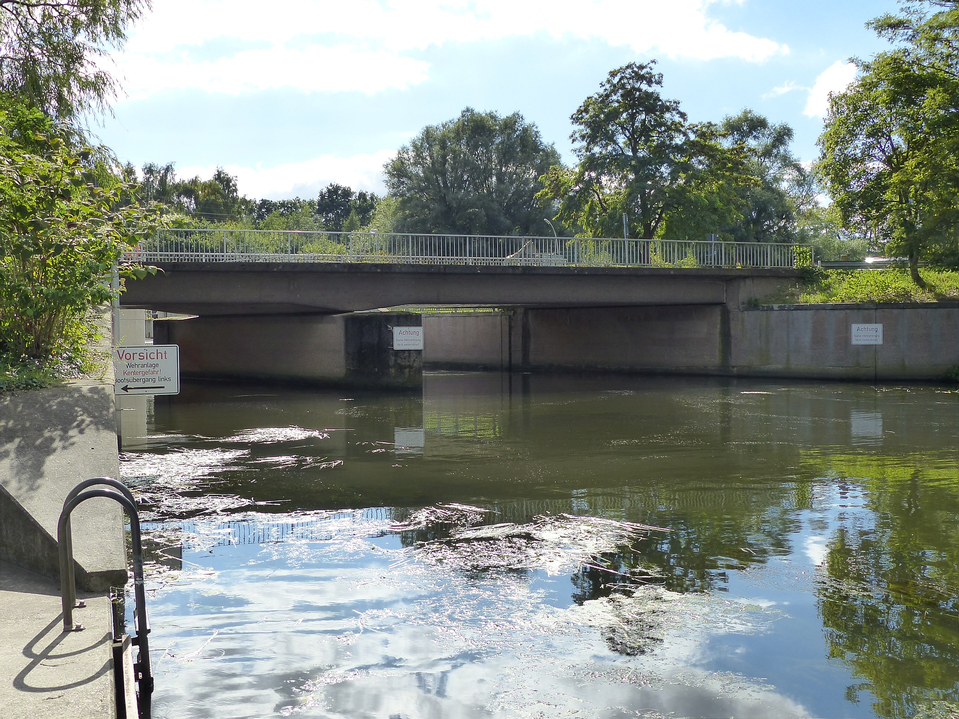 Brücke der Eisenbütteler Straße über die Oker, Ansicht von Norden 2015.